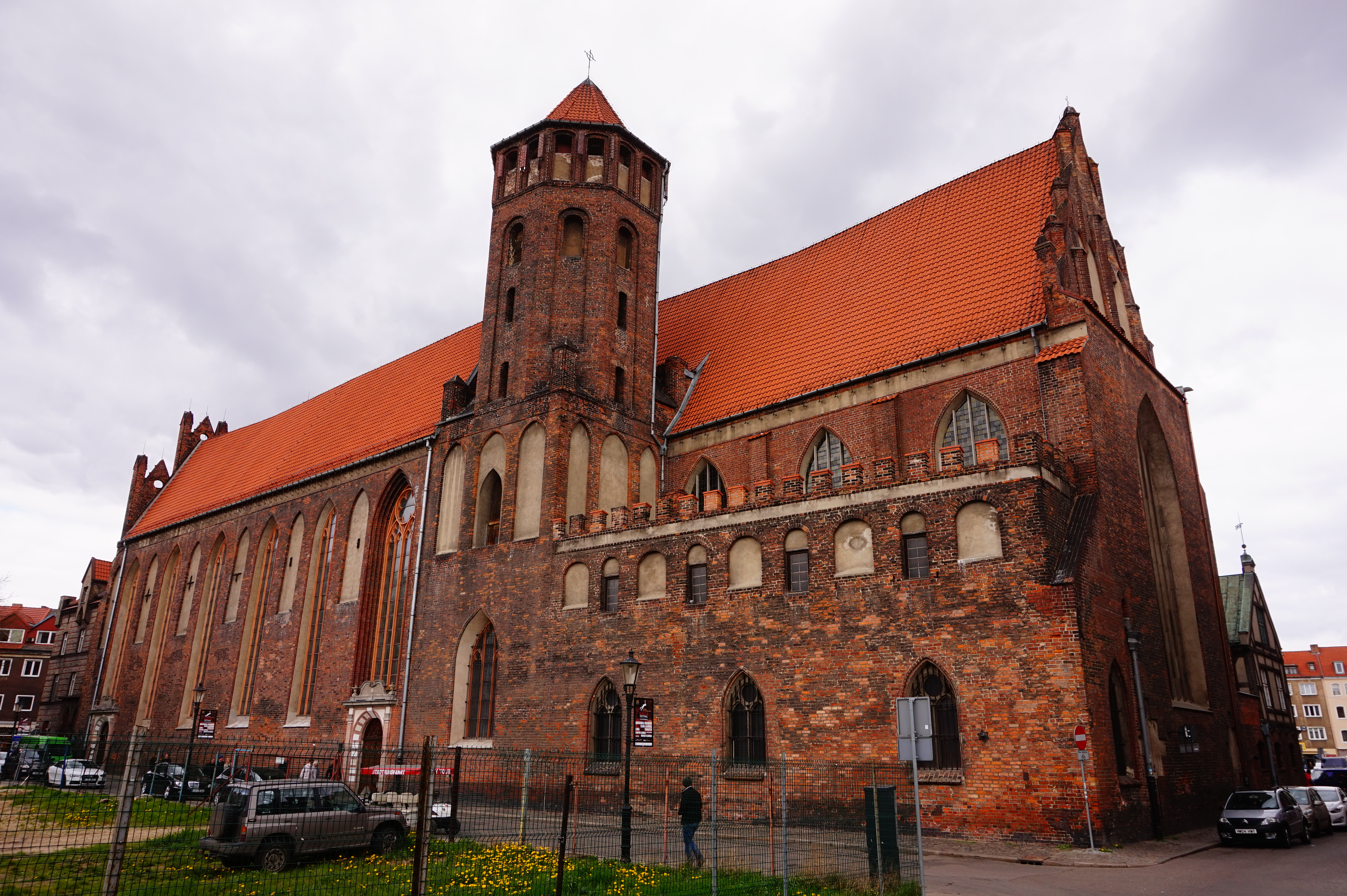 Gdańsk. Bazylika Św. Mikołaja